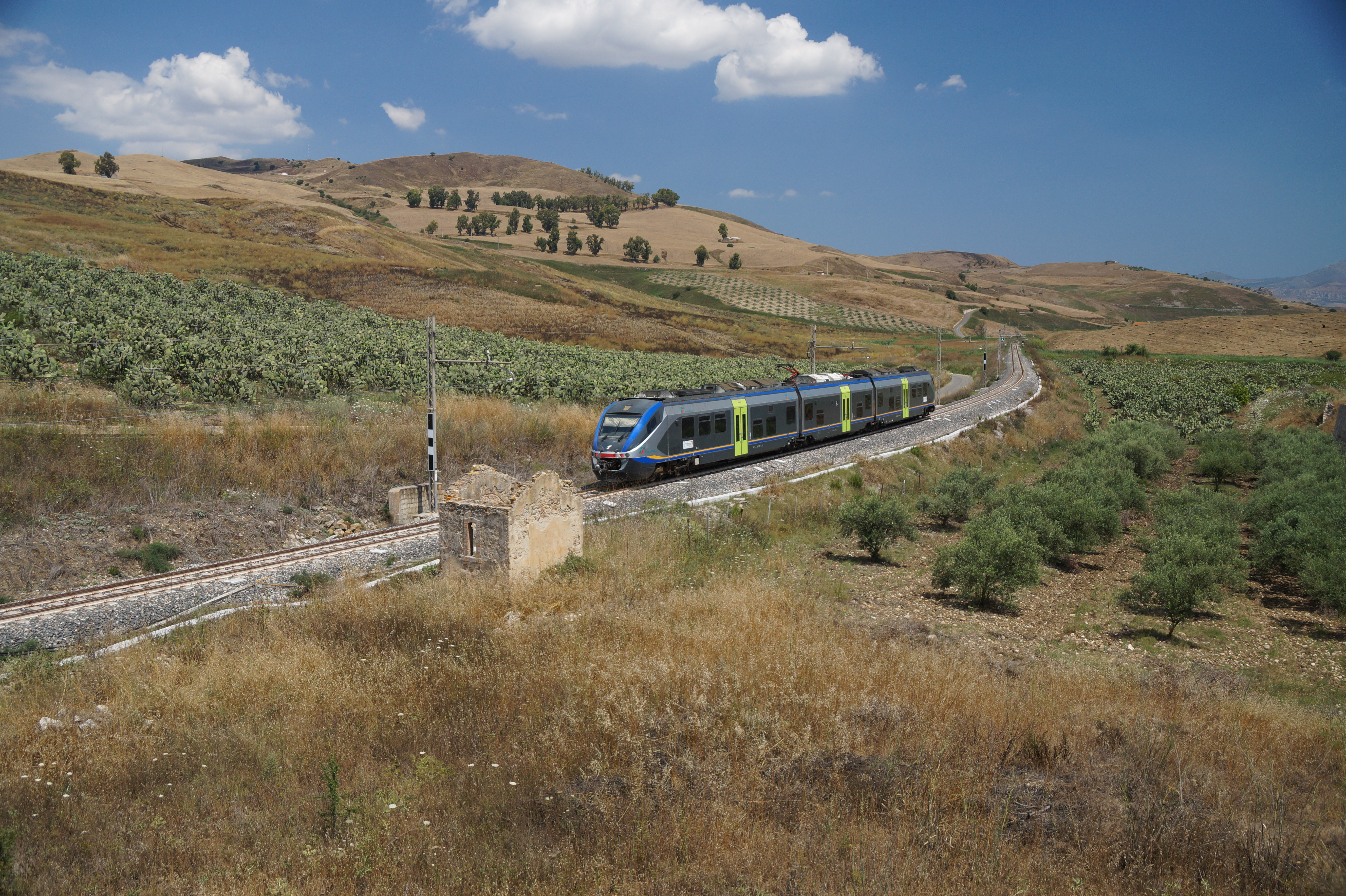 Ein ALe 501 in der Nähe von Roccapalamba-Alia